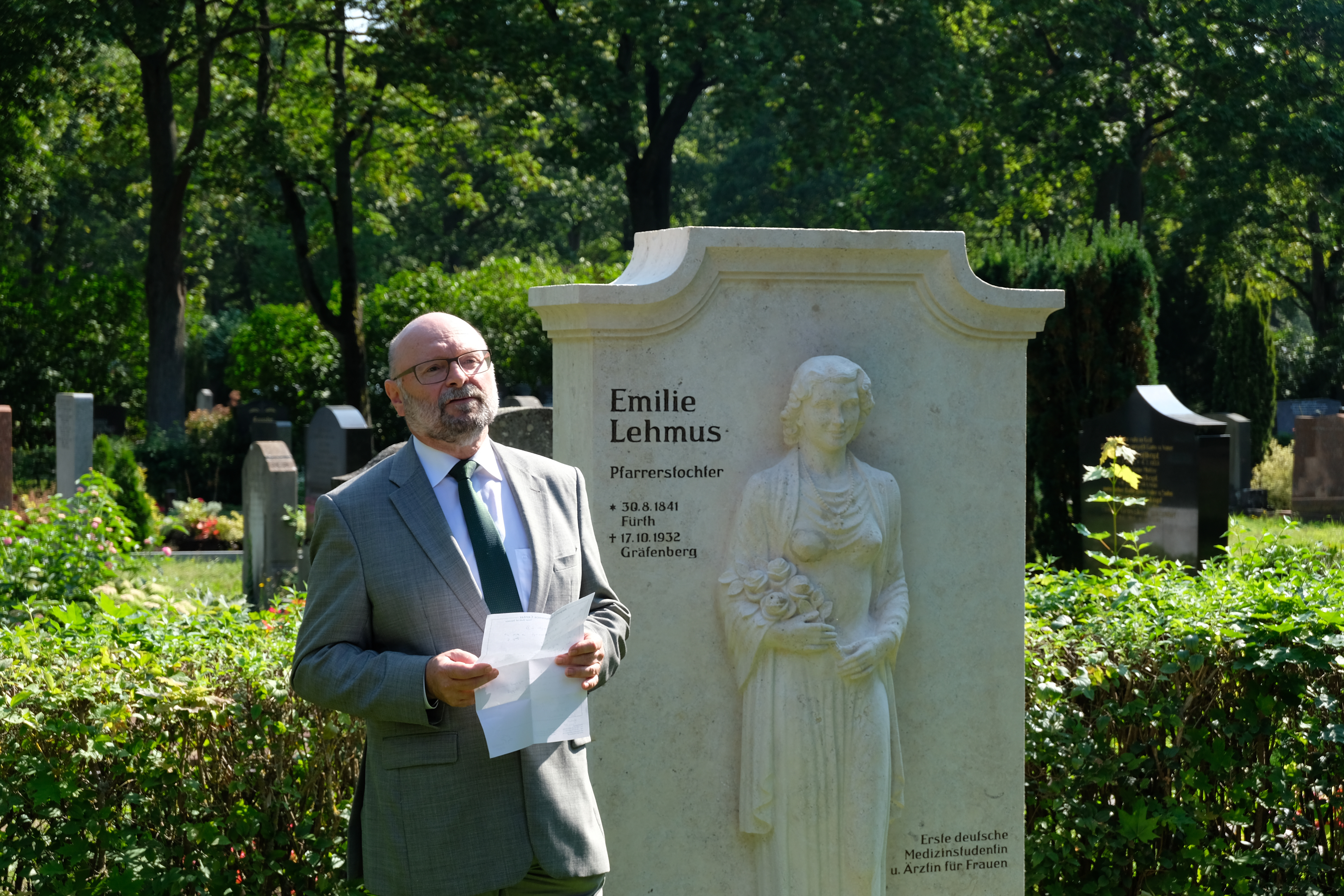 Gedenkveranstaltung auf dem städtischen Friedhof in Fürth mit Prof. Dr. Anton Scharl anlässlich der Einweihung der Gedenkstätte der ersten deutschen Medizinstudentin und Ärztin Emilie Lehmus, Aug. 2019